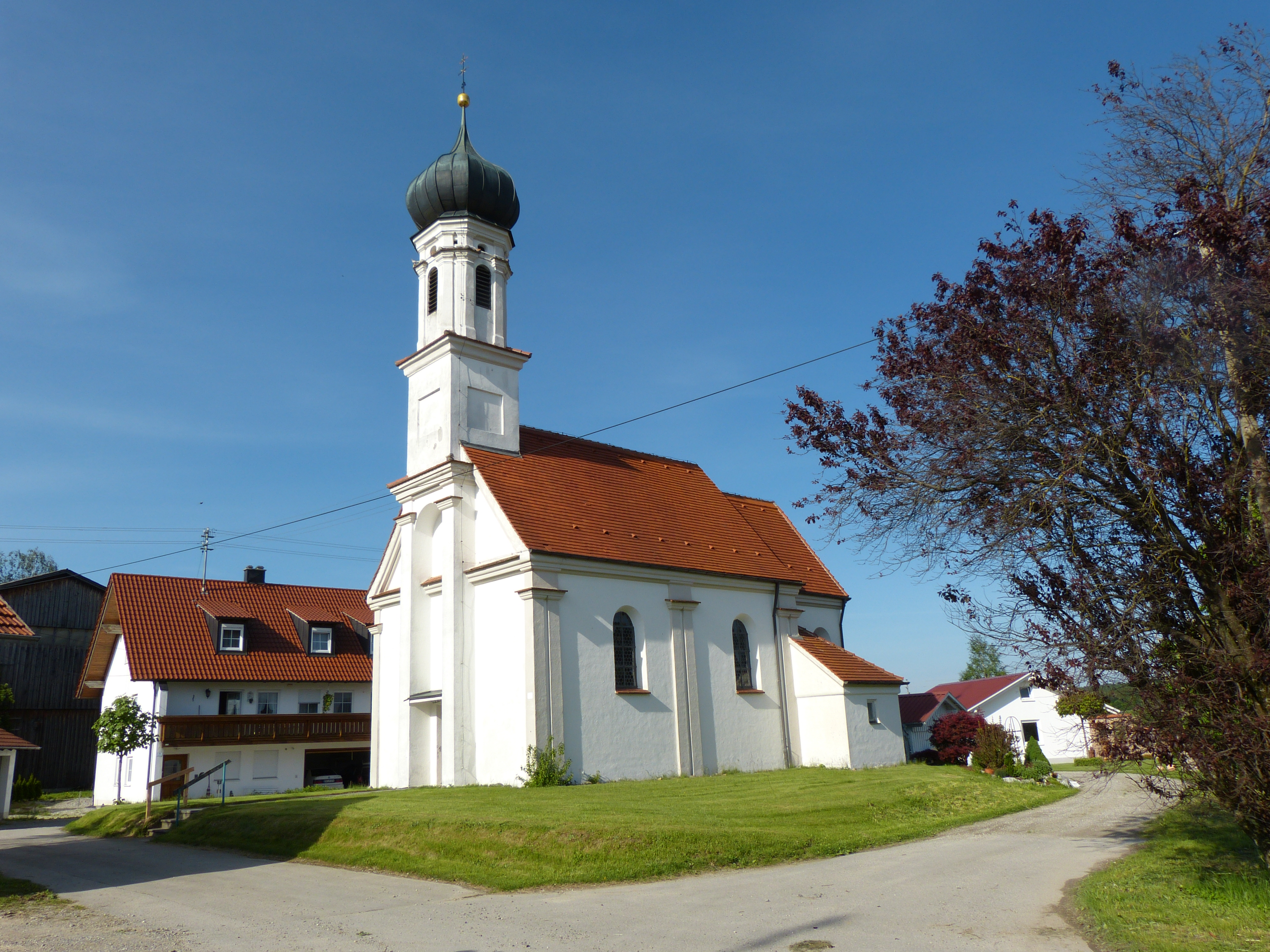 St. Georg, Mittelrieden, Landkreis Unterallgäu, Bayern